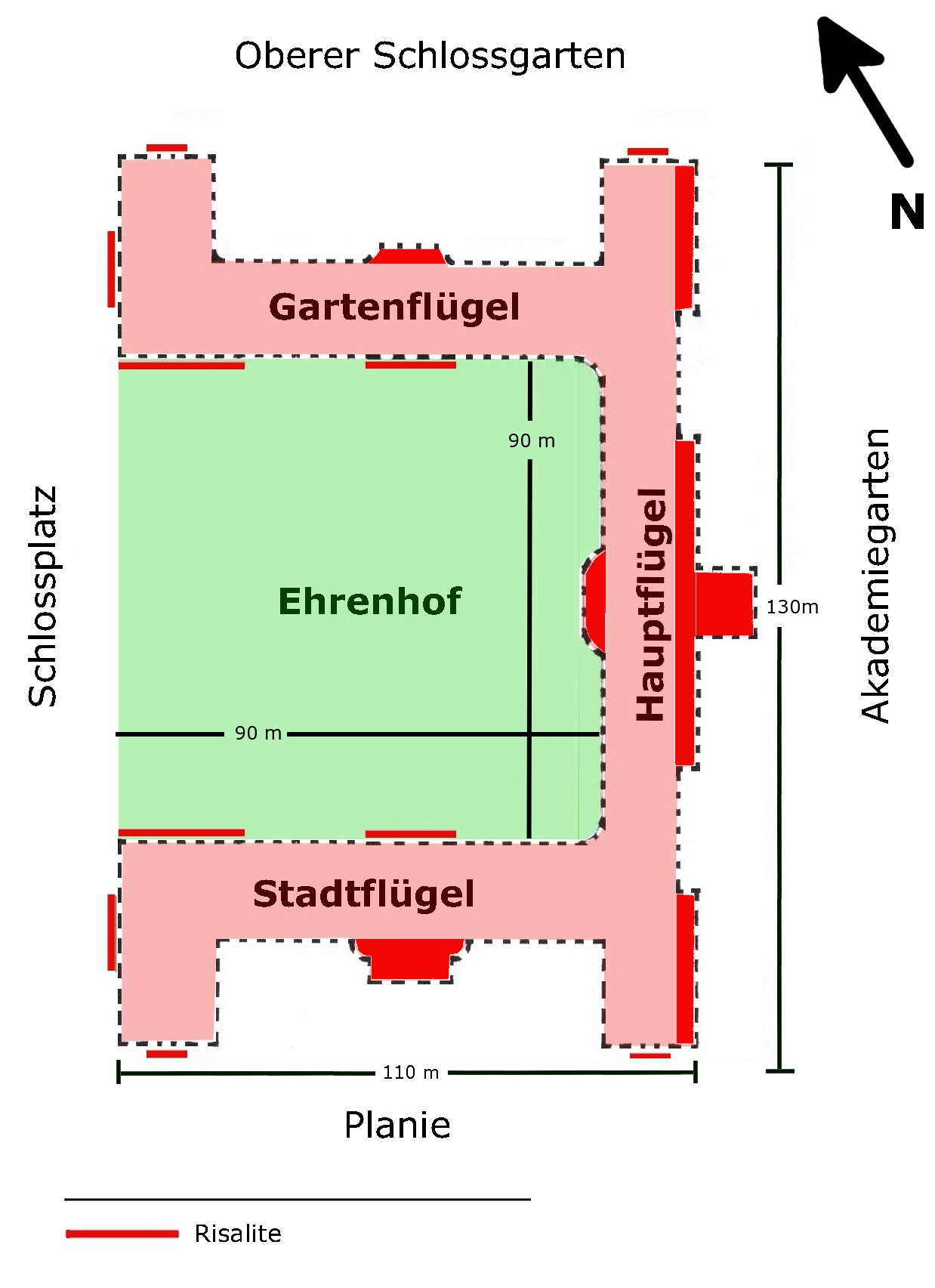 Neues Schloss Stuttgart, Grundriss des Erdgeschosses.